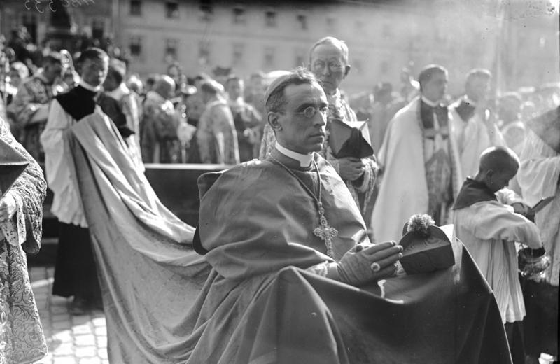 Zur 900 Jahr-Feier der Stadt Bamberg in Bayern fand anläßlich derselben eine große Prozession unter anwesenheit Ex-Kronprinzen Ruprechts von Bayern, Ex König Ferdinand von Bulgarien, Nuntius Pacelli, sämtlicher Erzbischöfe Deutschland und anderen Hoher Kirchlicher Würdentrager statt. Der Vertreter des Papstes in Deutschland Quintius Pacelli beim Gebet auf der Strasse.